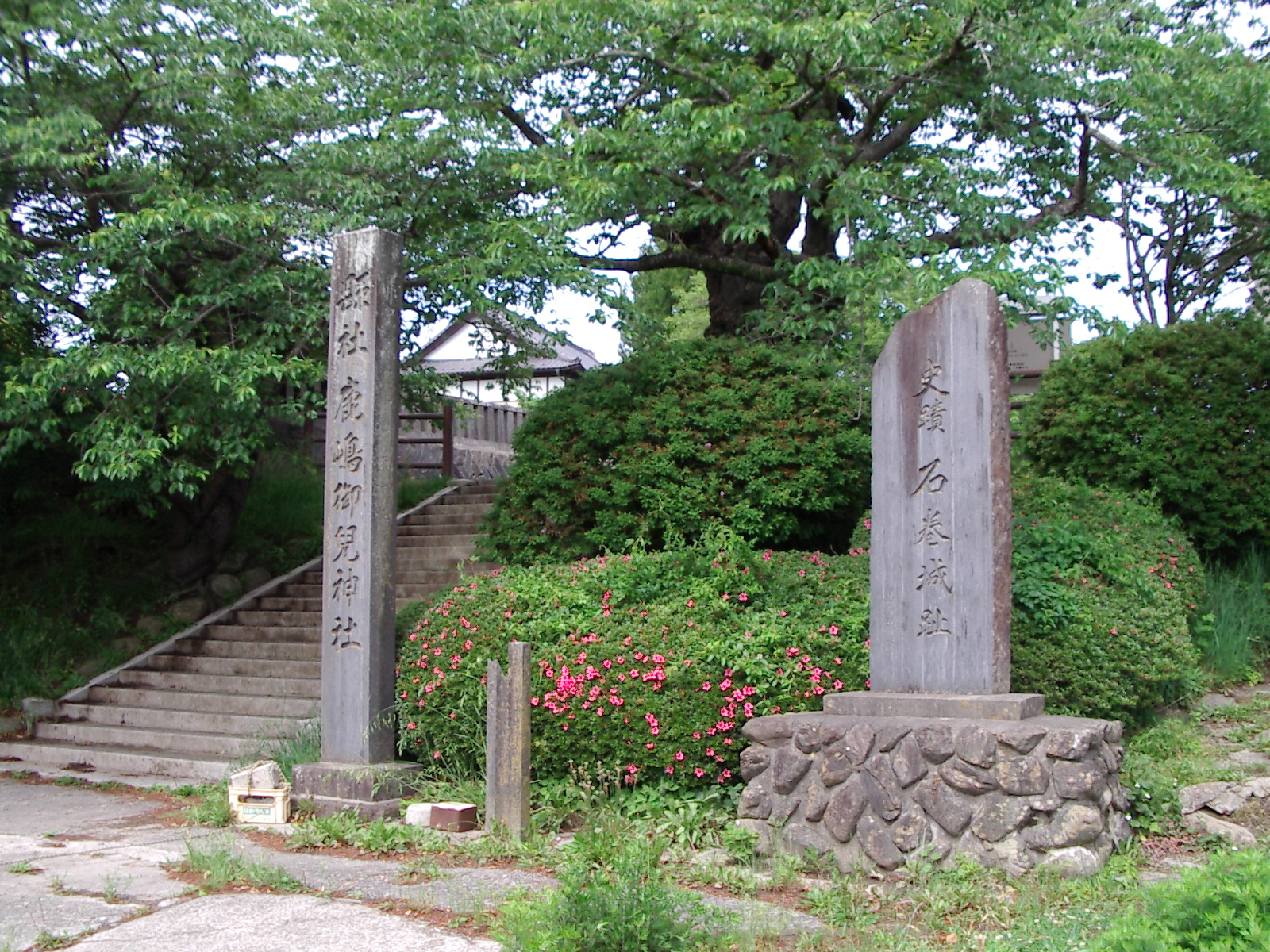 宮城県石巻市日和山公園（石巻城址）